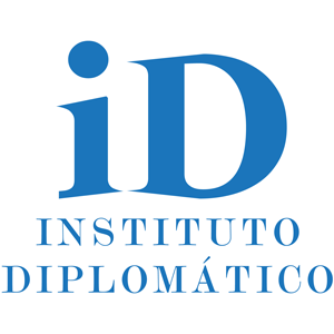 Logótipo do Instituto Diplomático